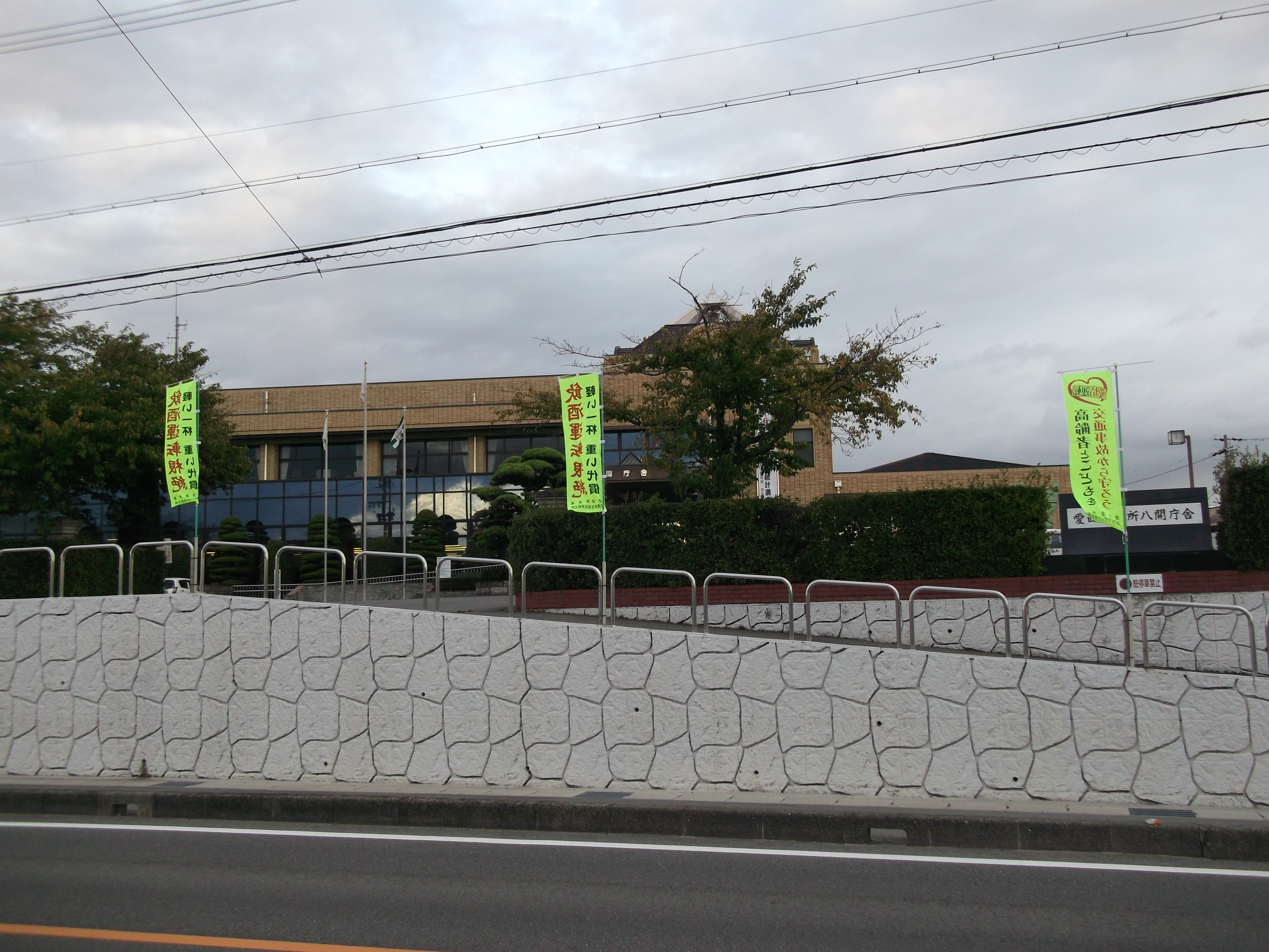 愛西市江西町の愛西市役所八開分庁舎を南側公道より撮影